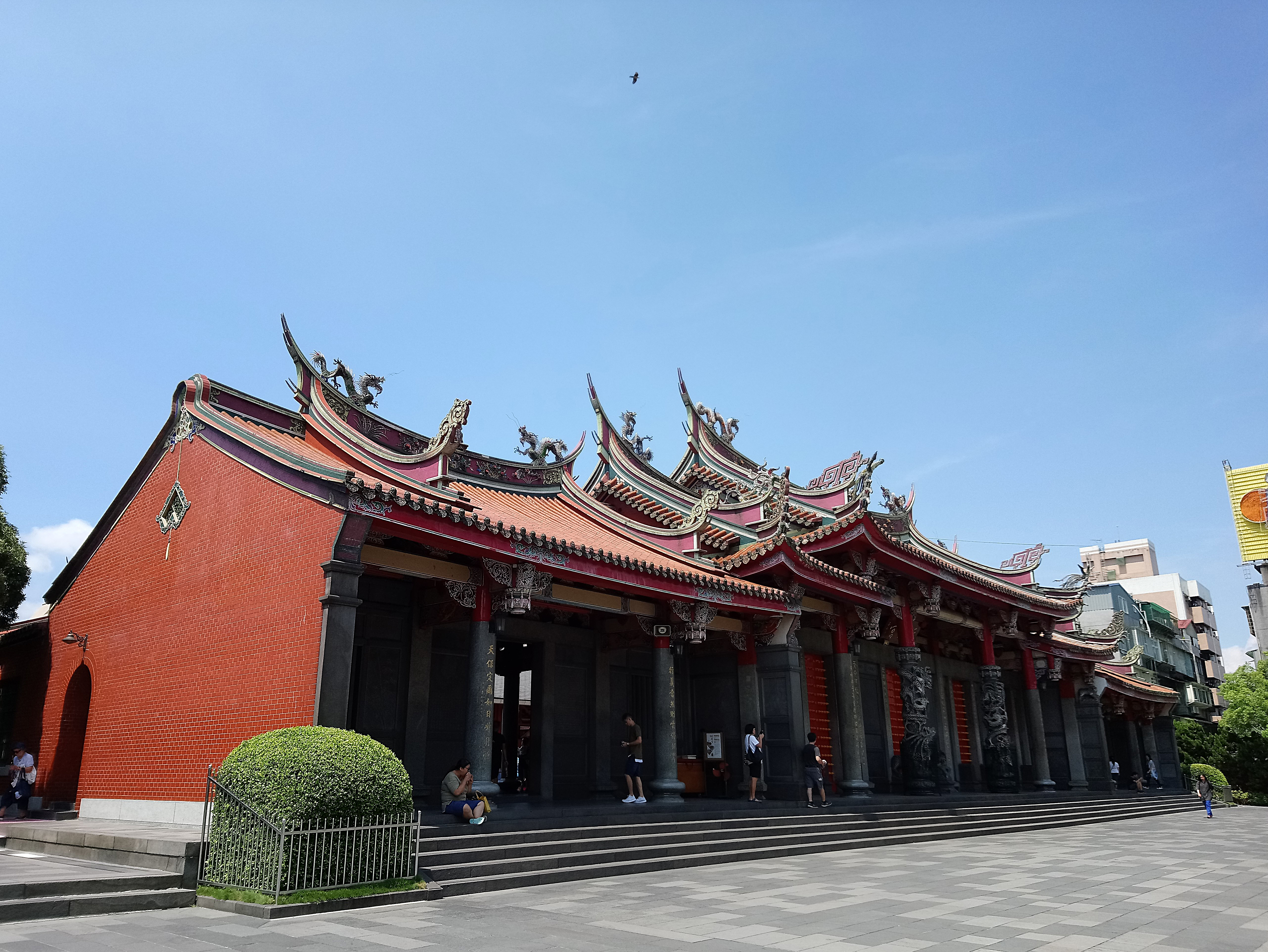 行天宮臺北本宮,臺北市中山區下埤頭次分區行政里